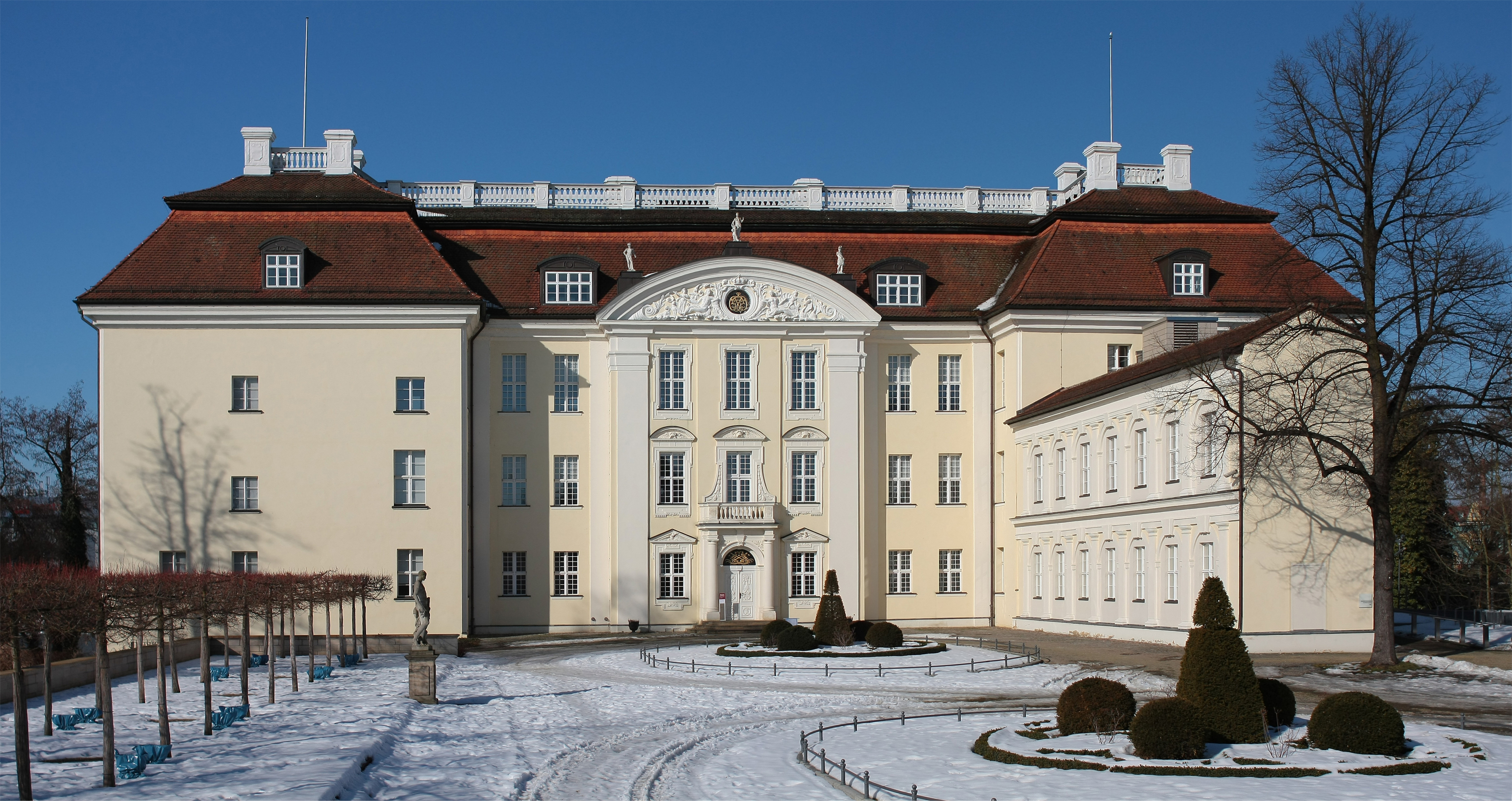 Hofseitige Ansicht des Schlosses Köpenick, rechts der angebaute Galerieflügel.